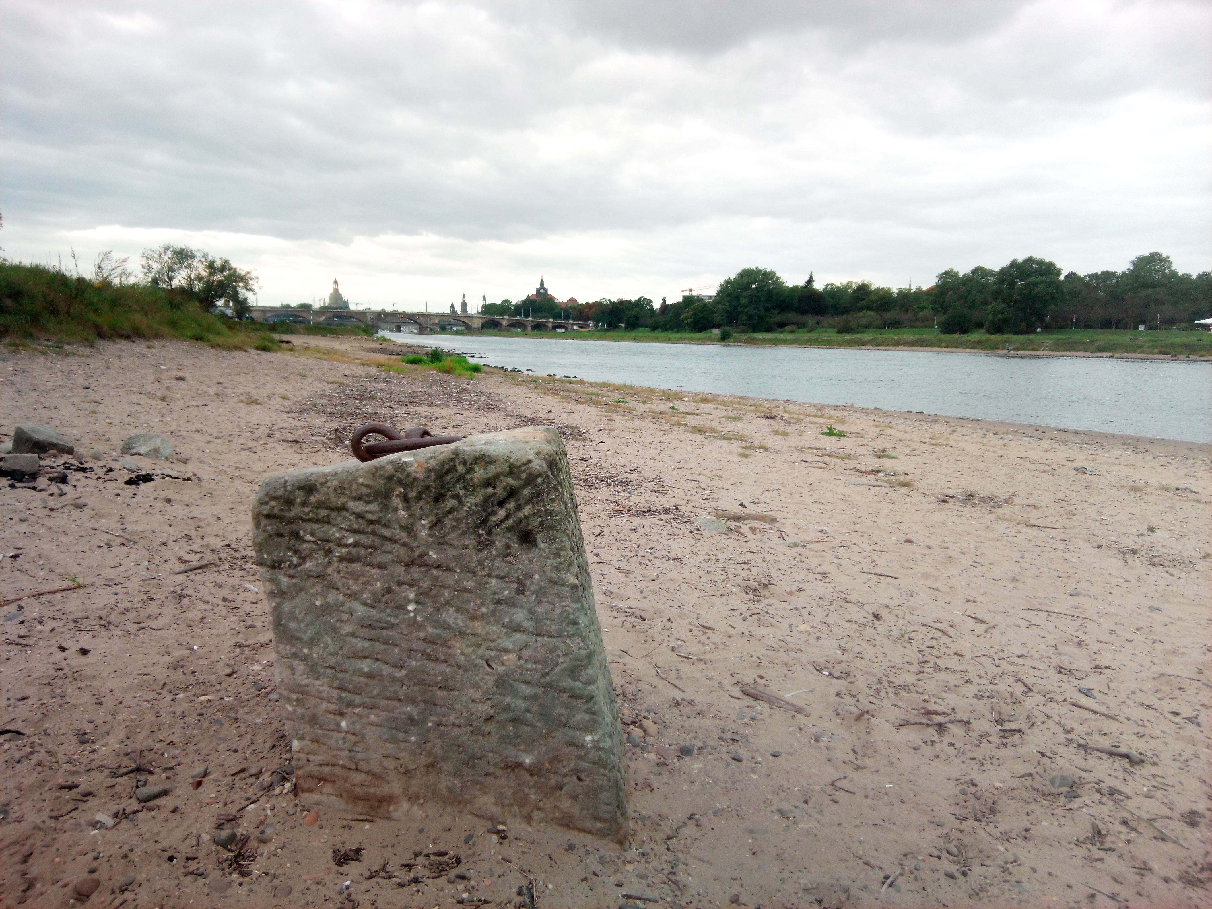 Sandsteinpoller an der Elbe mit eingelassenen Eisenringen des Landungssteg für den ehemaligen Wasserflugplatz Dresden-Johannstadt